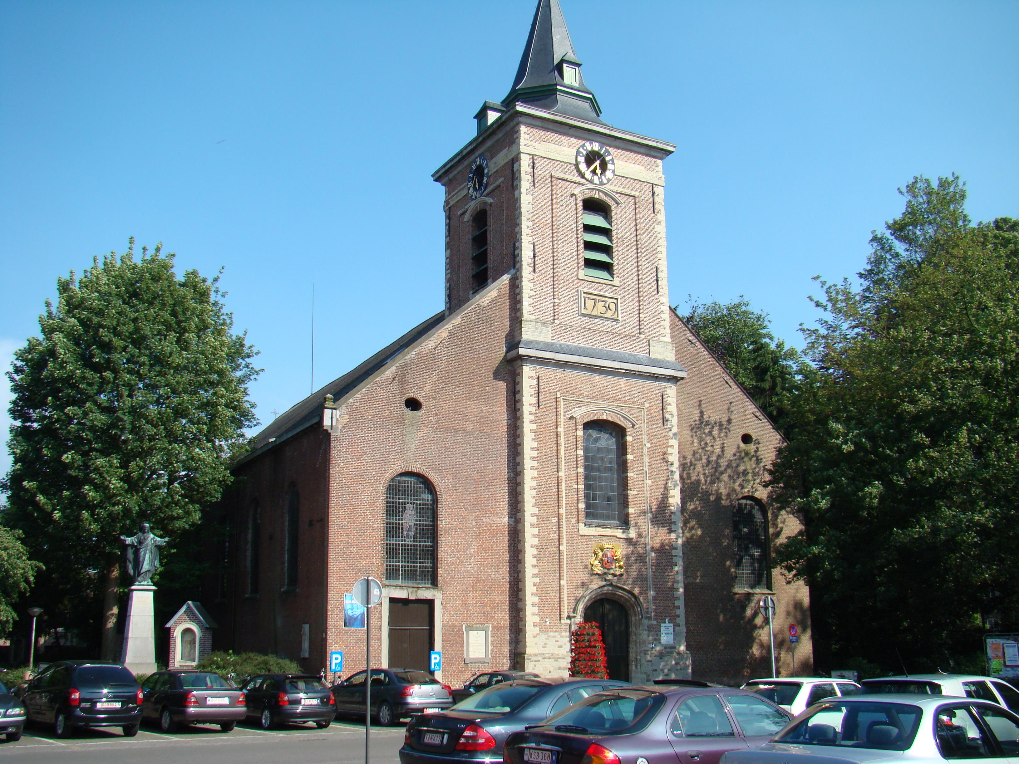 Sint-Amanduskerk in Ingelmunster Church of Saint Amandus Ingelmunster, West Flanders, Belgium